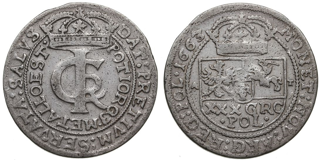 tymf (tynf) - złotówka 1663